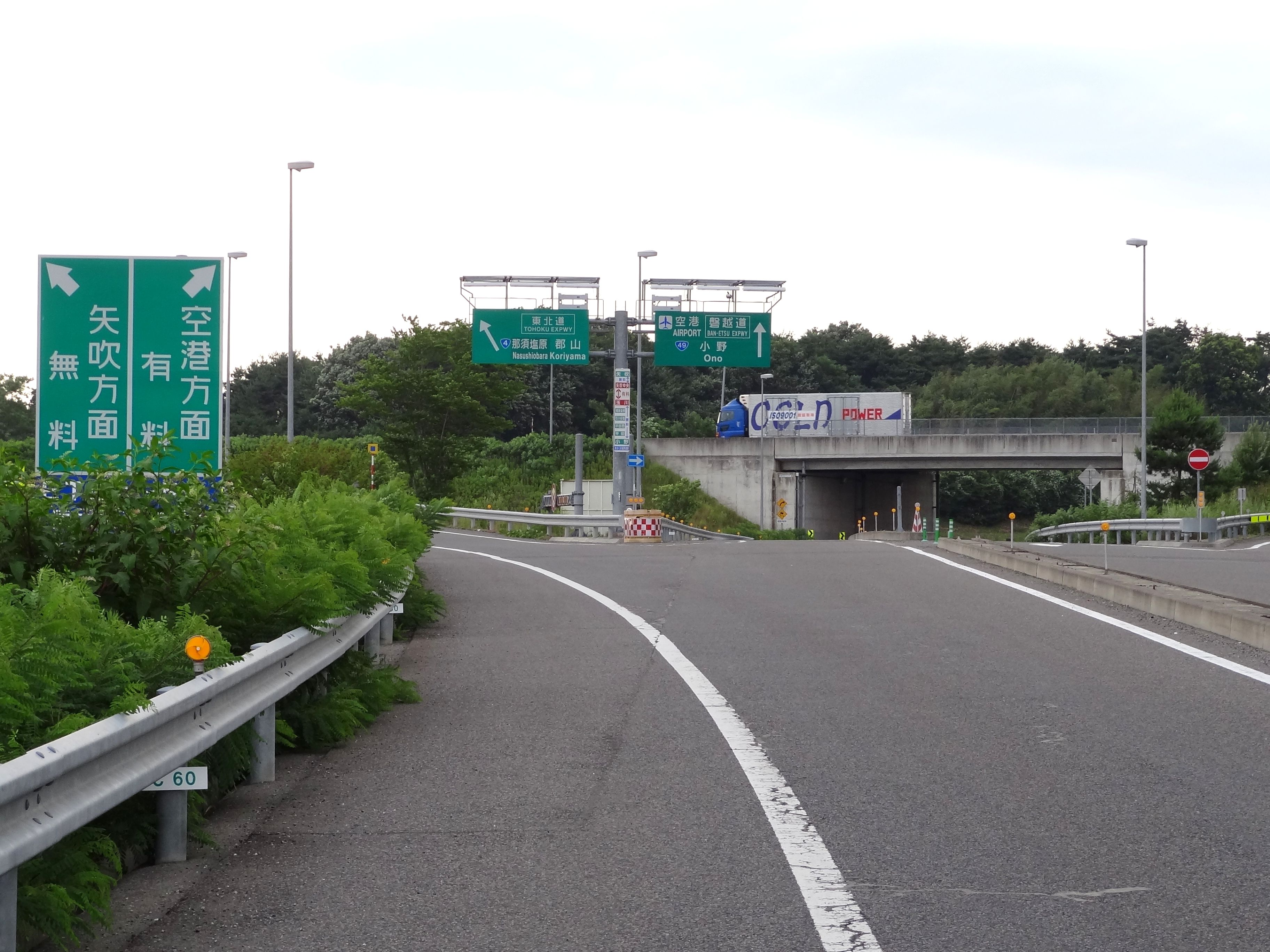 あぶくま高原道路 矢吹中央IC（入口付近）